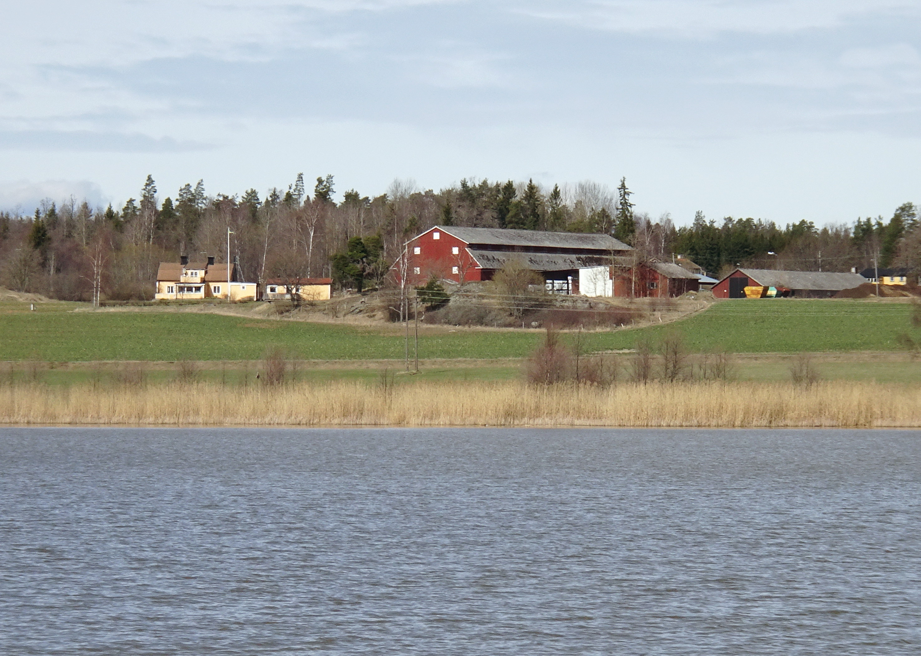 Lida gård med Lillsjön i förgrunden